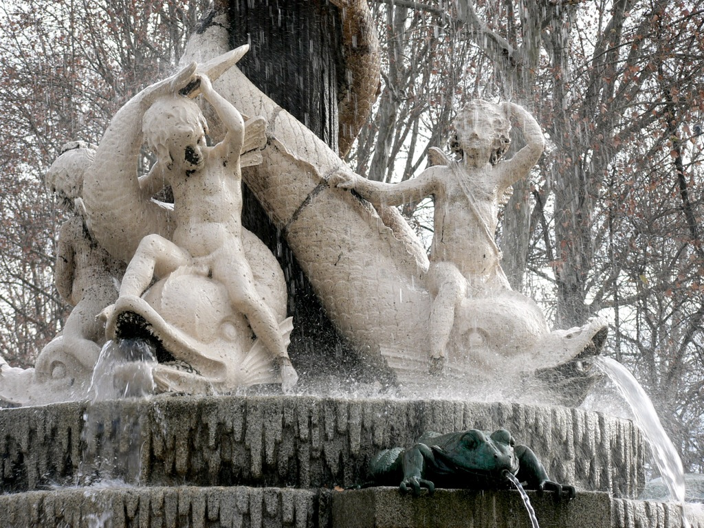 Galápagos Fountain (detail). Parque del Retiro, Madrid, Spain